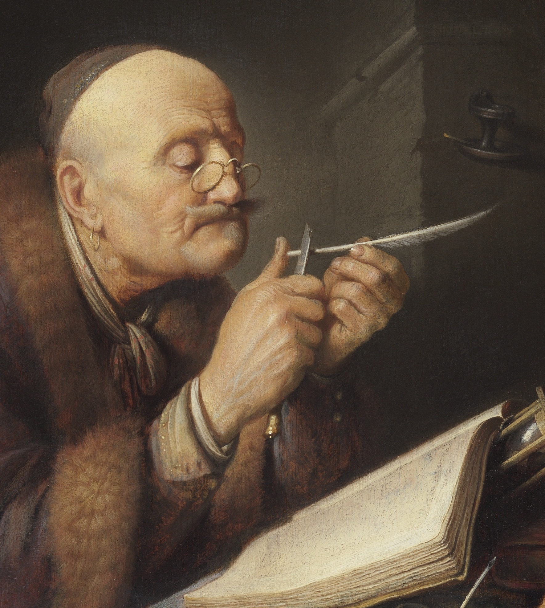 Gerrit Dou, Geleerde die zijn pen snijdt, 1630-1635, The Leiden Collection NY